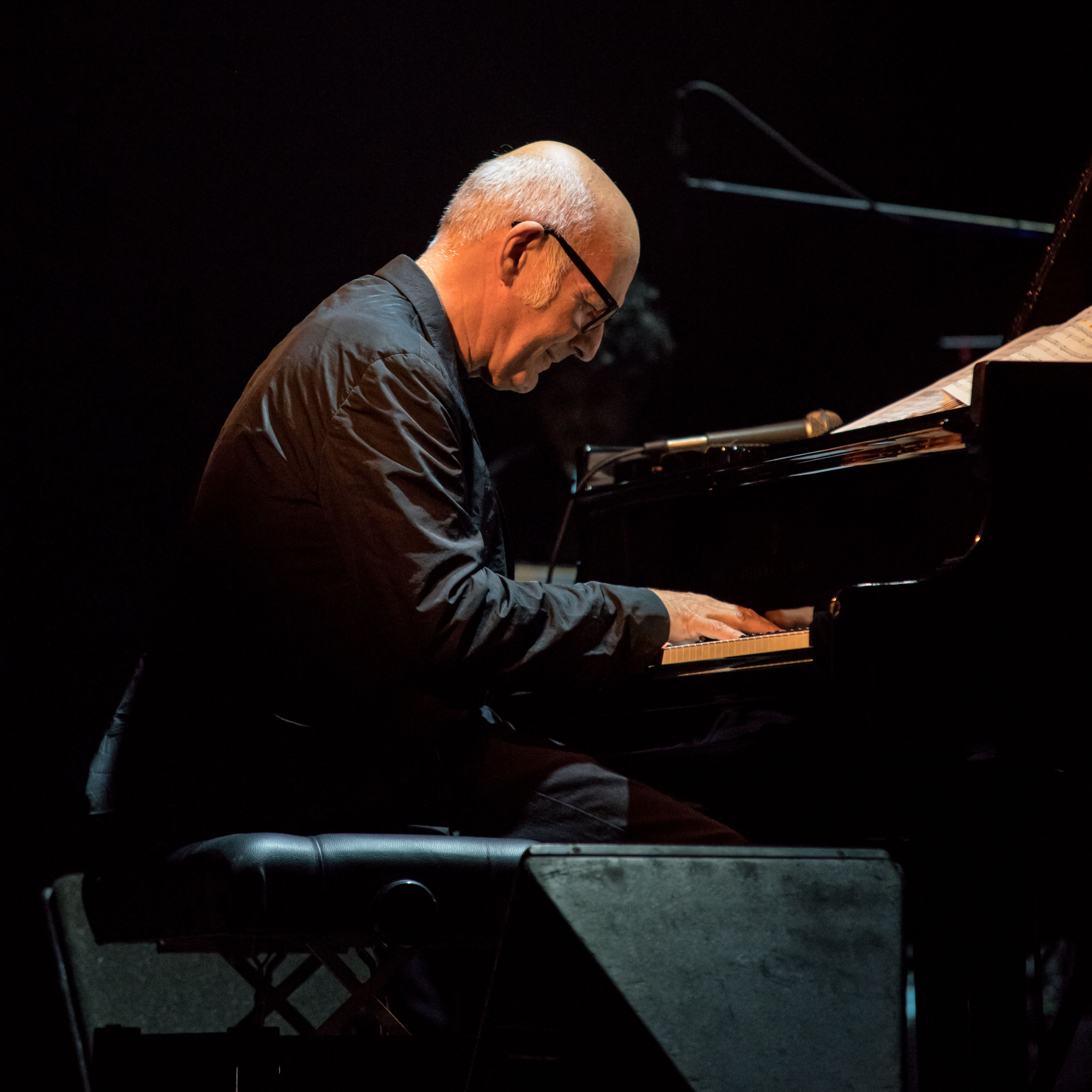 Bilder vom Zelt Musik Festival 2016 in Freiburg im Breisgau Ludovico Einaudi und Ensemble